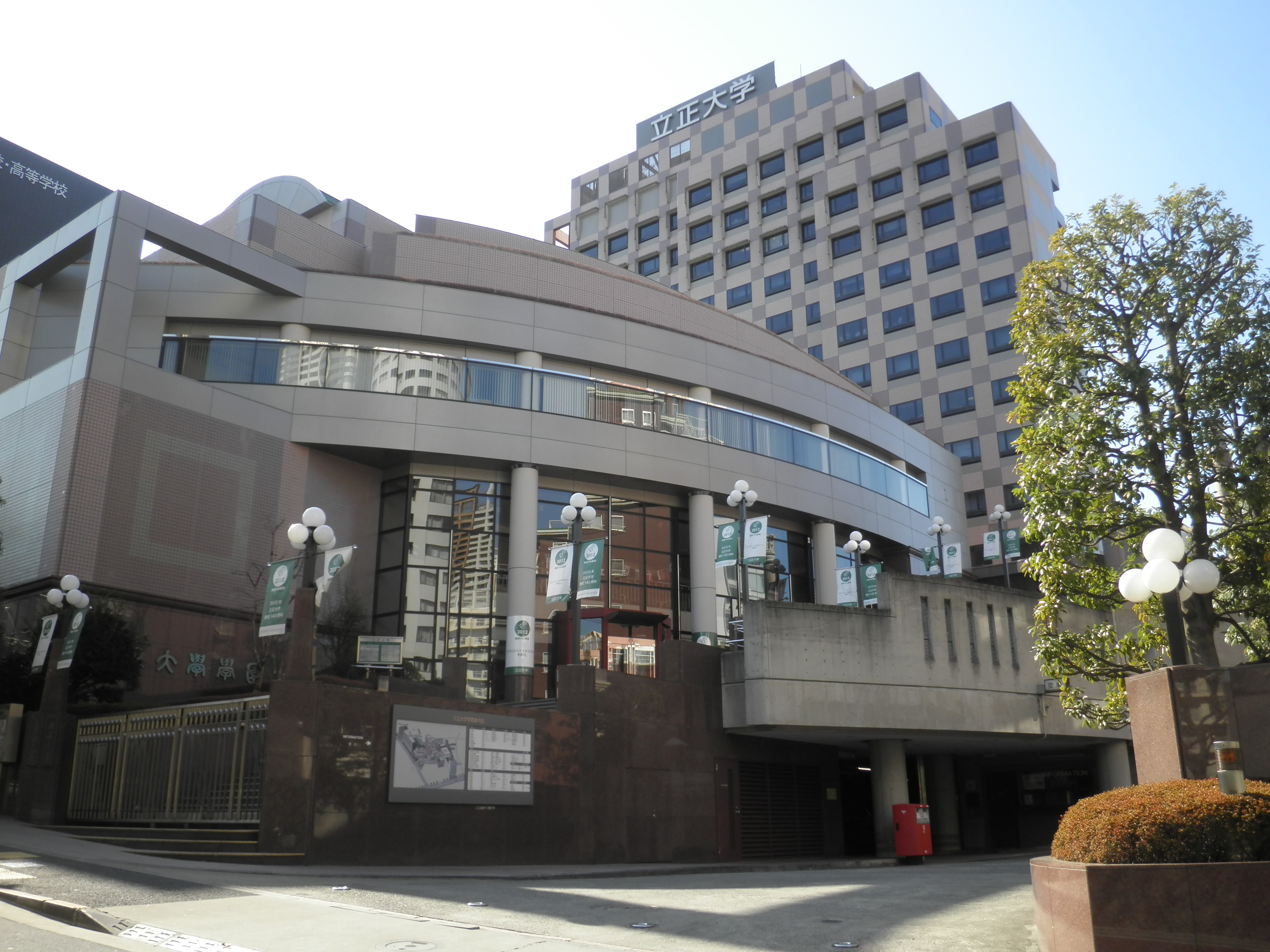 立正大学大崎キャンパス正門、Rissho Univ Osaki Campus